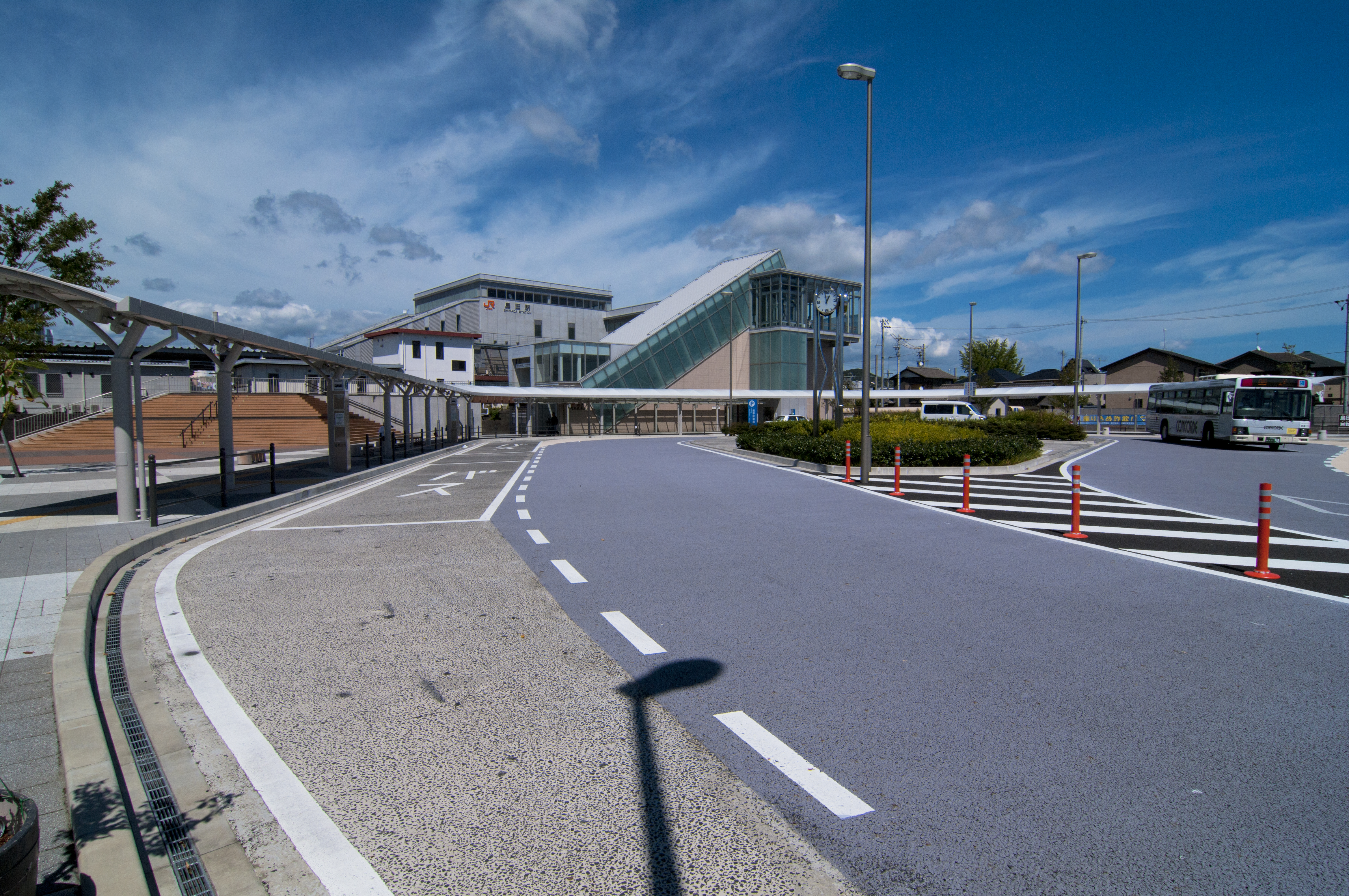 東海旅客鉄道株式会社東海道本線島田駅南口